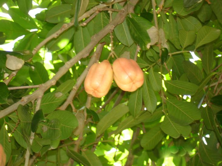 Fruto del Arbol en la casa de Doña Carmen, Las Colinas, San Pedro de Macorís.